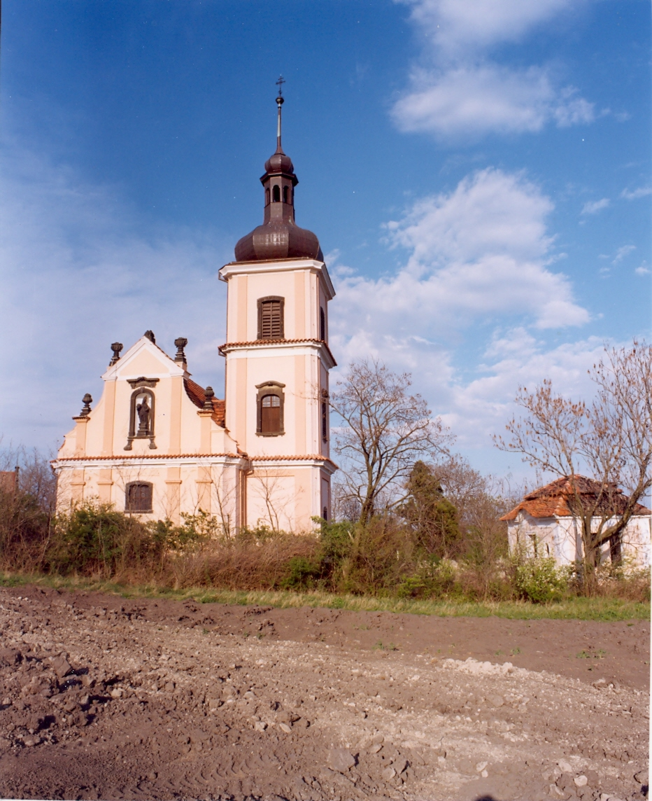 Kostel svatého Mikuláše (Orasice), Orasice